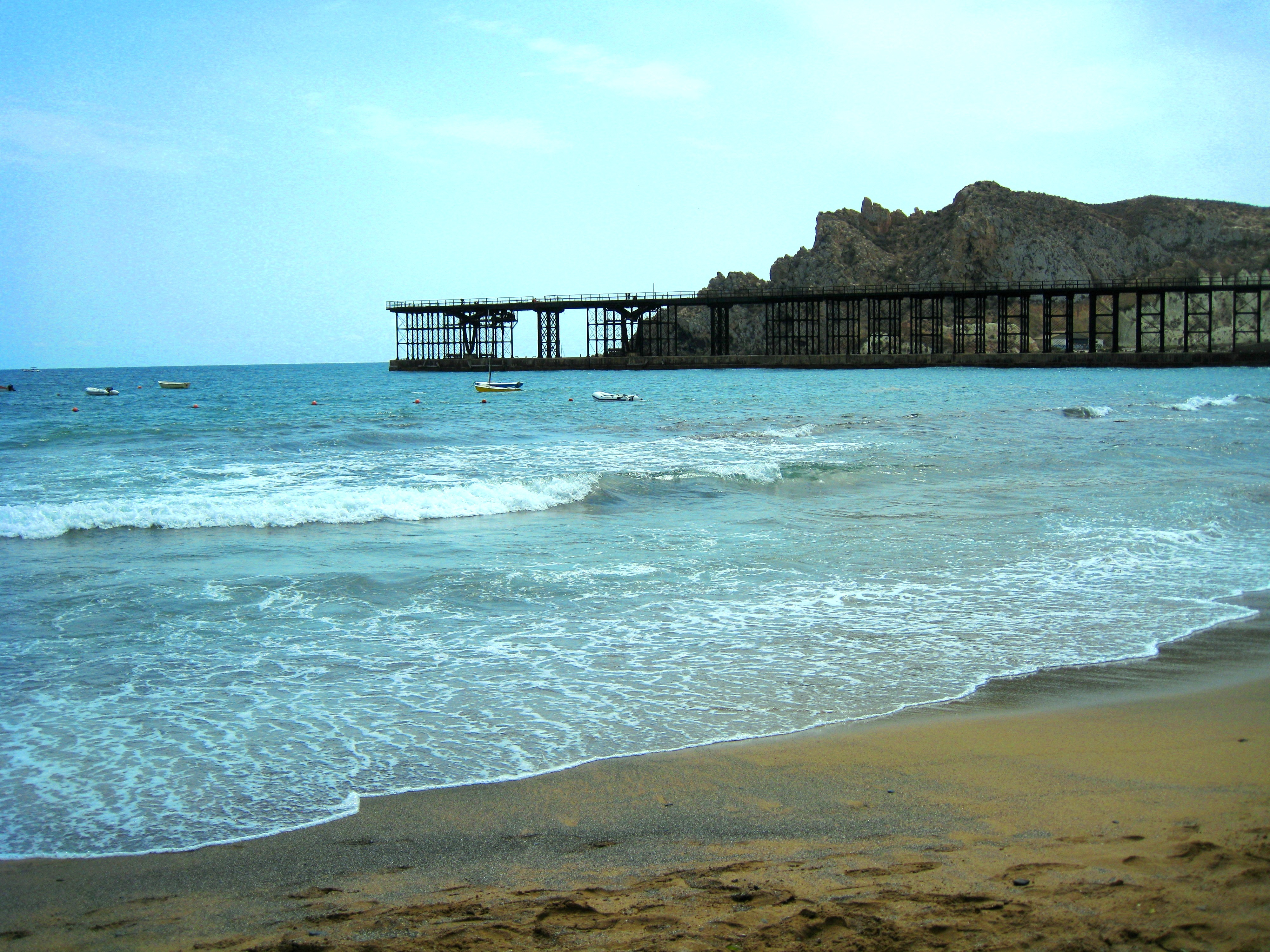 Embarcadero del Hornillo, en la playa del mismo nombre de Águilas (Región de Murcia, España)